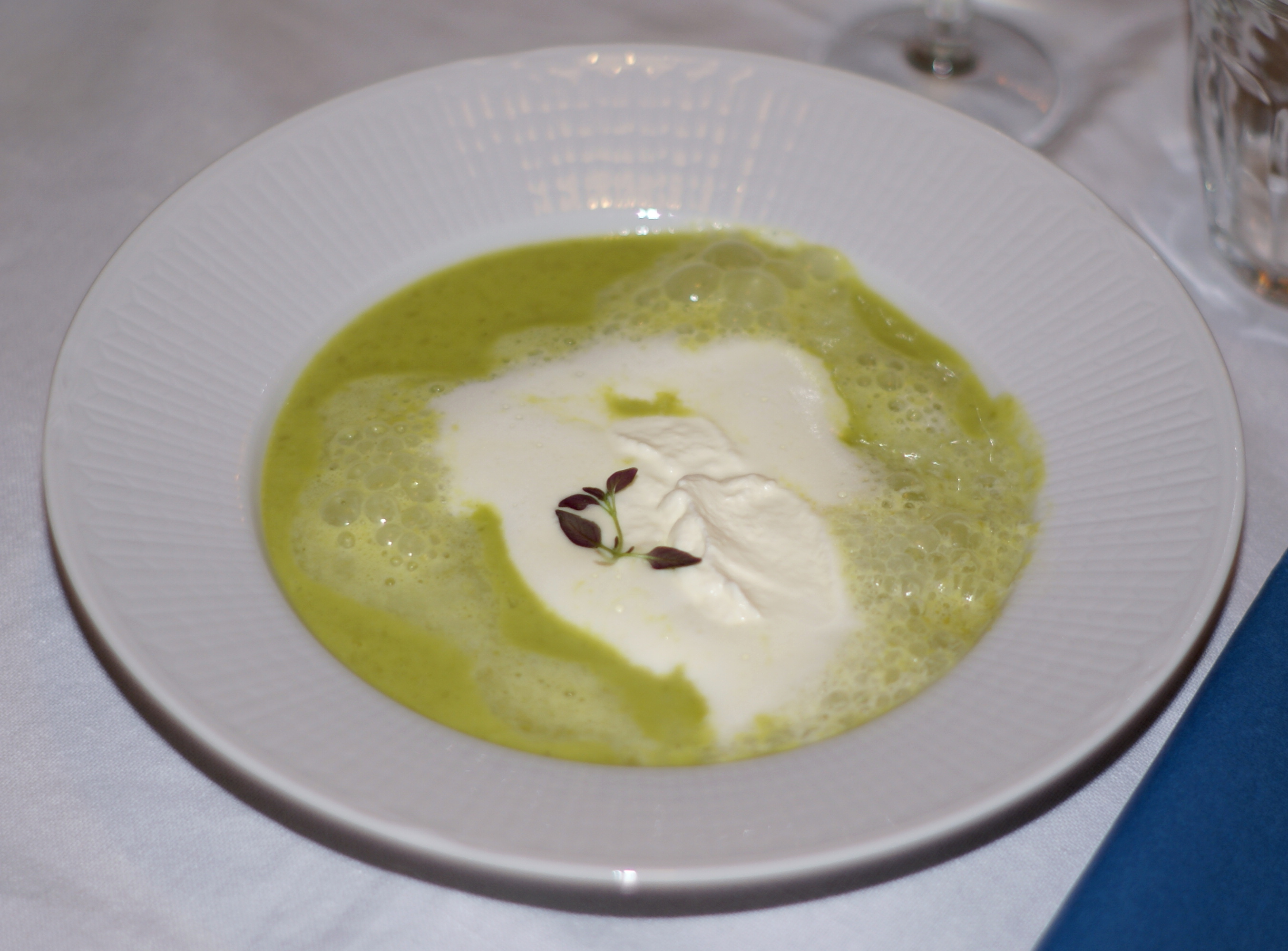 Creme Ninon, grön ärtsoppa serverad med vispgrädde, champagne och en liten timjanskvist